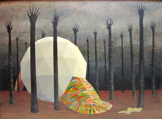 Somni de somni' 78 x 102 cm de Jesús de Vilallonga, 1975, col.lecció particular.JPG